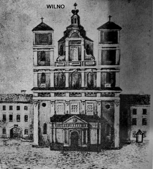 Widok fasady kościoła św. Kazimierza w Wilnie przed przebudową dokonaną przez Rosjan po Powstaniu styczniowym w 1867 r. Ponieważ kościół nadal nosi koronę zdjętą w 1796 roku, musi to być widok sprzed 1797 roku.